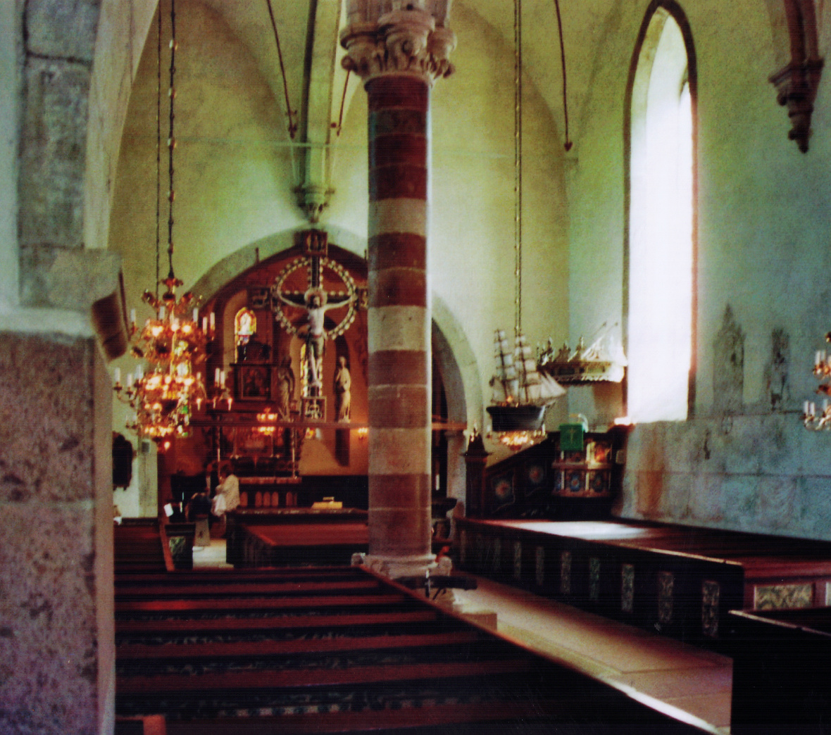 Kirche von Rone, Gotland